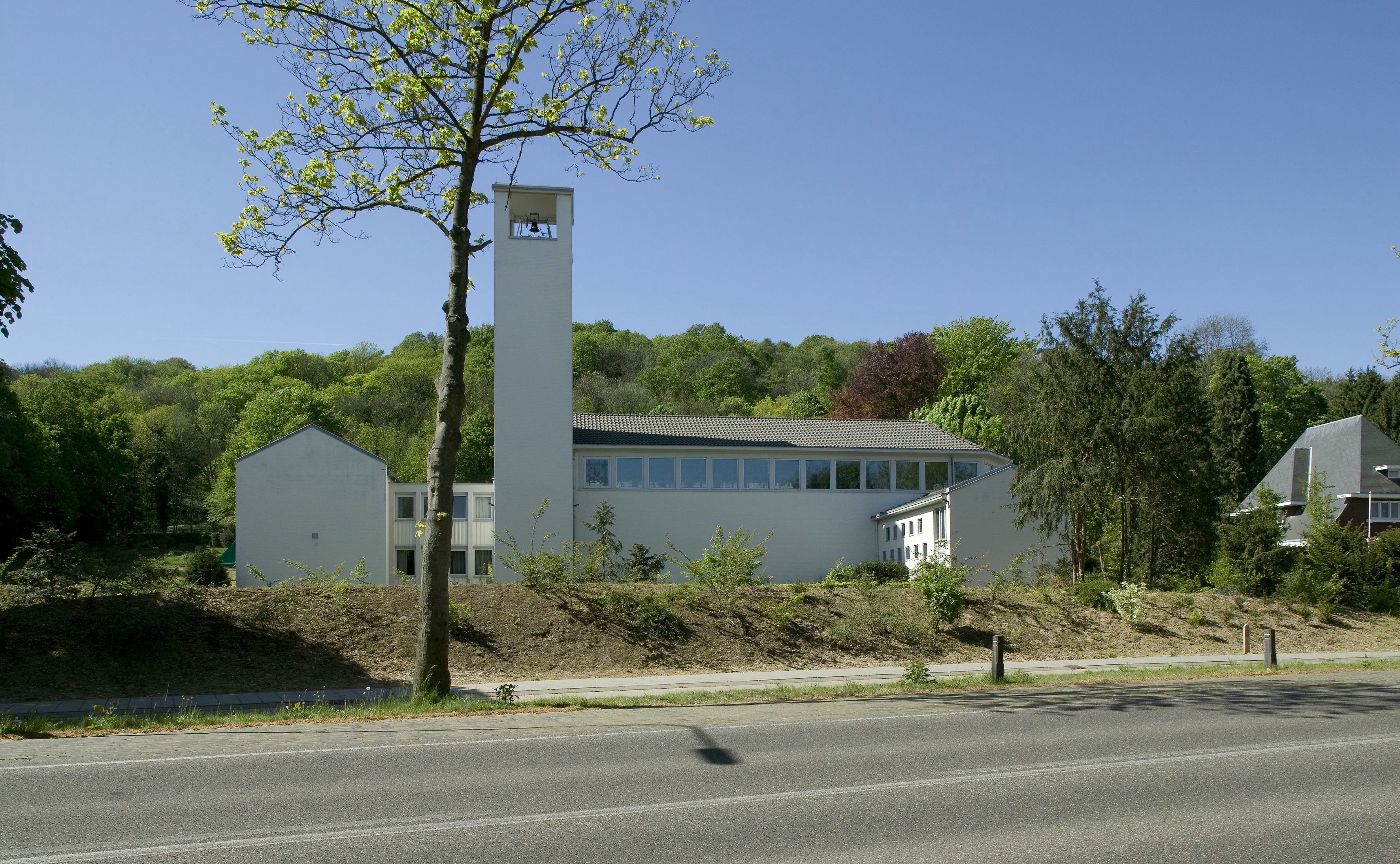 Priorij Regina Pacis: Aanzicht vanaf de straatzijde op de Priorij